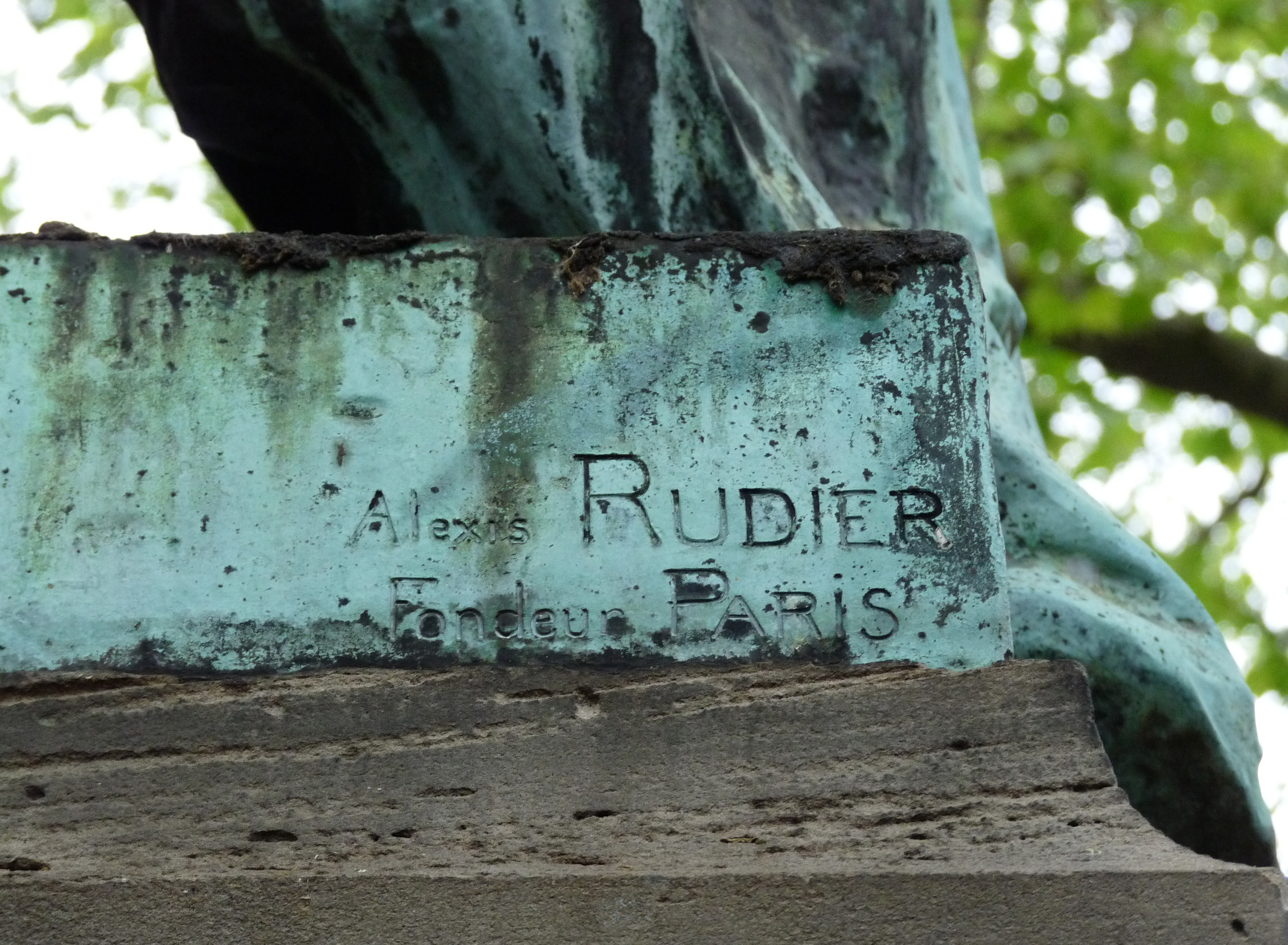 Signature de la fonderie Alexis Rudier sur la statue en bronze de Charles Adolphe Würz, place Saint-Pierre-le-Jeune, à Strasbourg